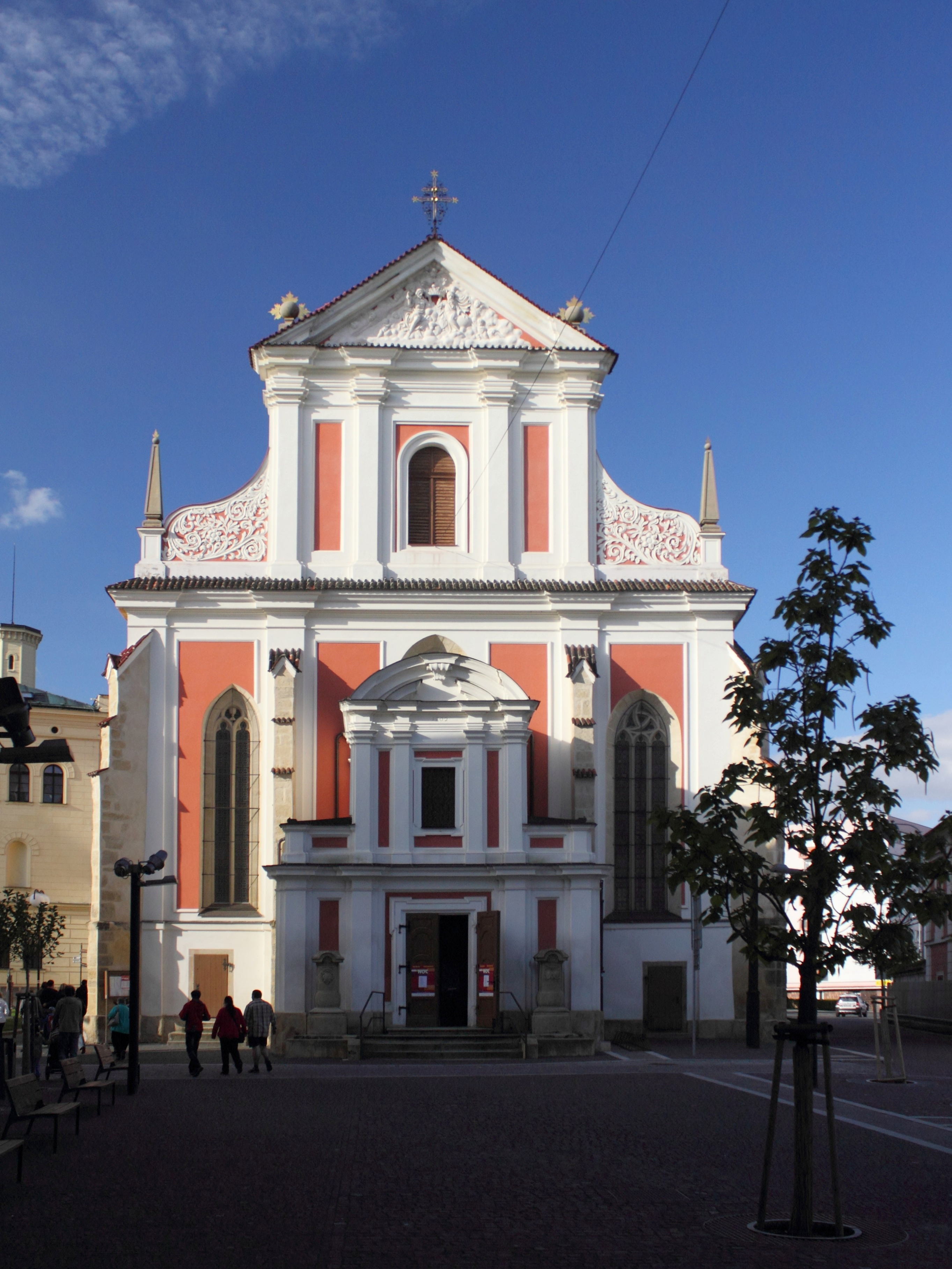 Kostel Nanebevzetí Panny Marie v Mladé Boleslavi